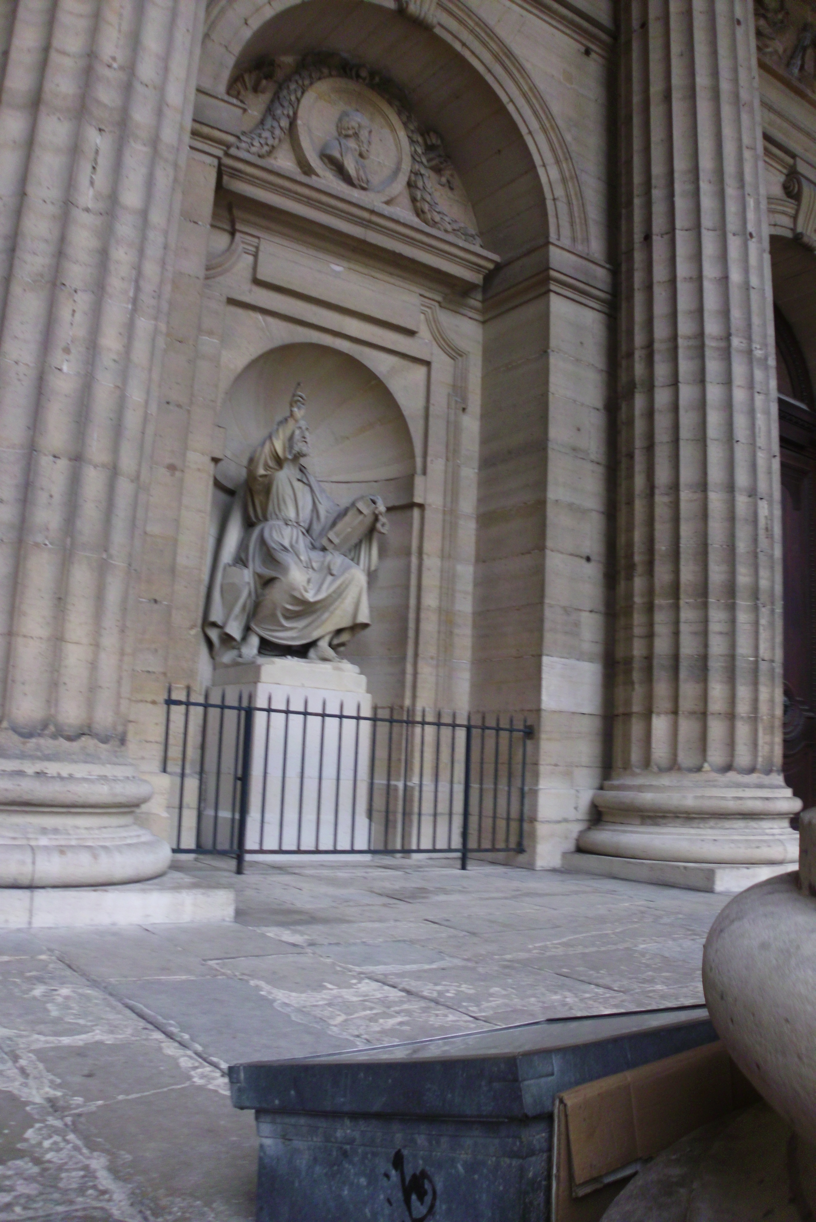 Eugène Émile Thomas, dit Émile Thomas (Français, 1817-1882): L'Apôtre saint Pierre, 1856, statue en pierre, façade de l'église Saint-Sulpice, VIe arrondissement, Paris, France.